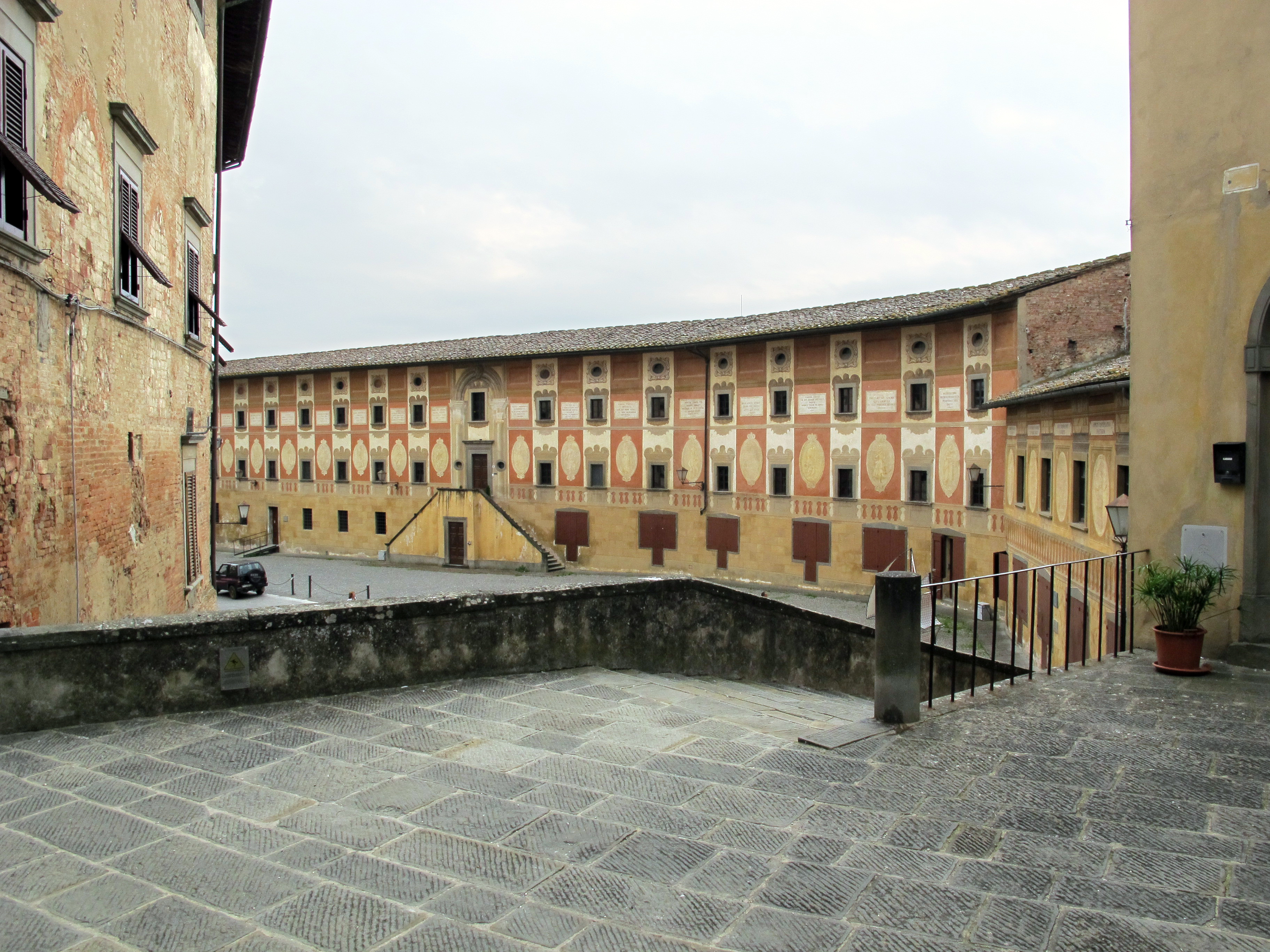 Palazzi di San Miniato